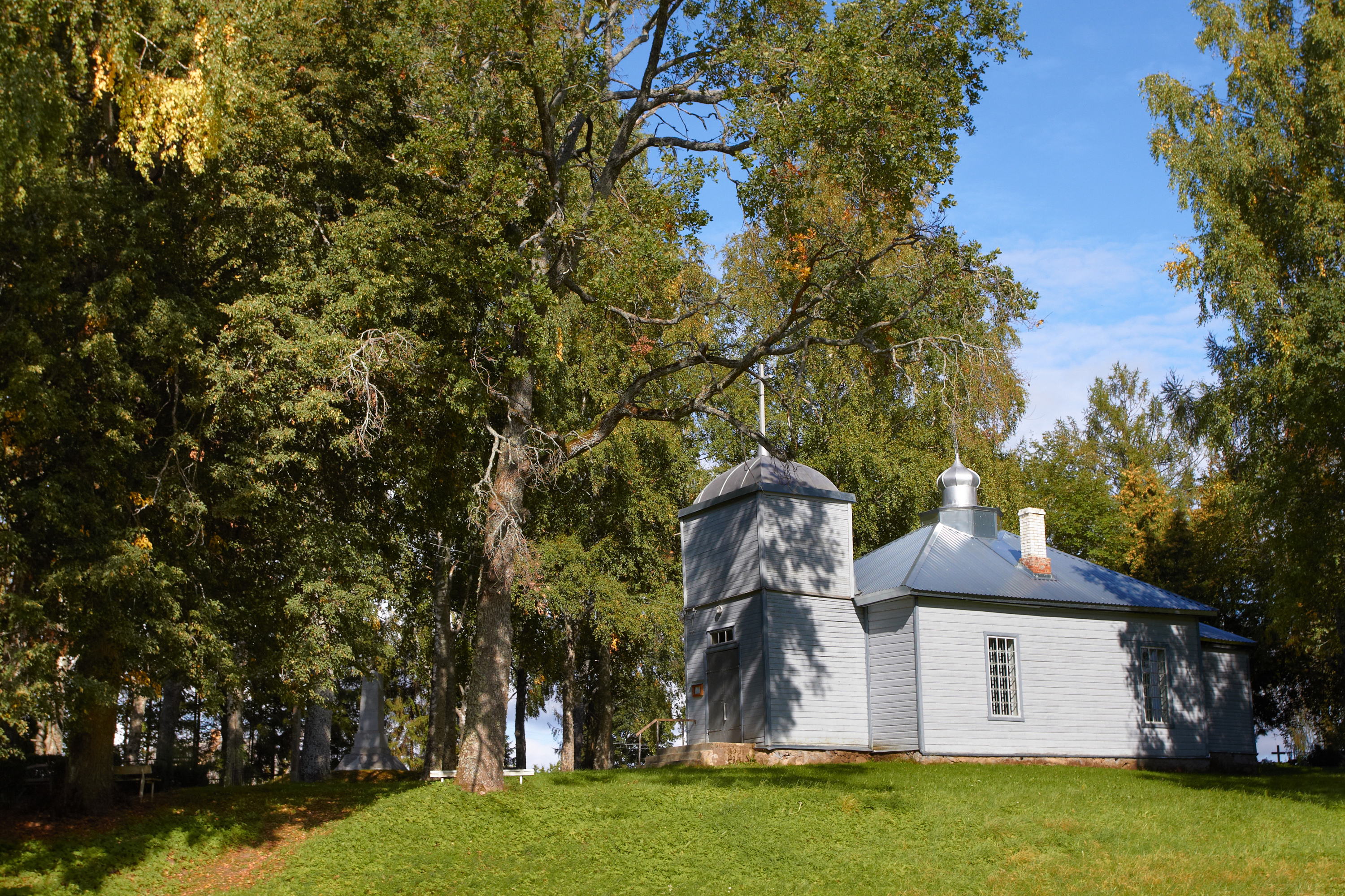 Meeksi kirik septembris 2011